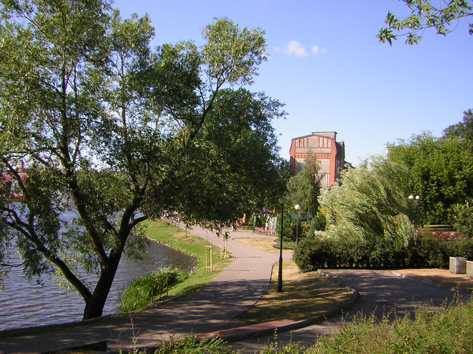 Bulwar Jana Pawła II Widok na Mały Jeziorak i zabytkowy Młyn Elektryczny w Iławie